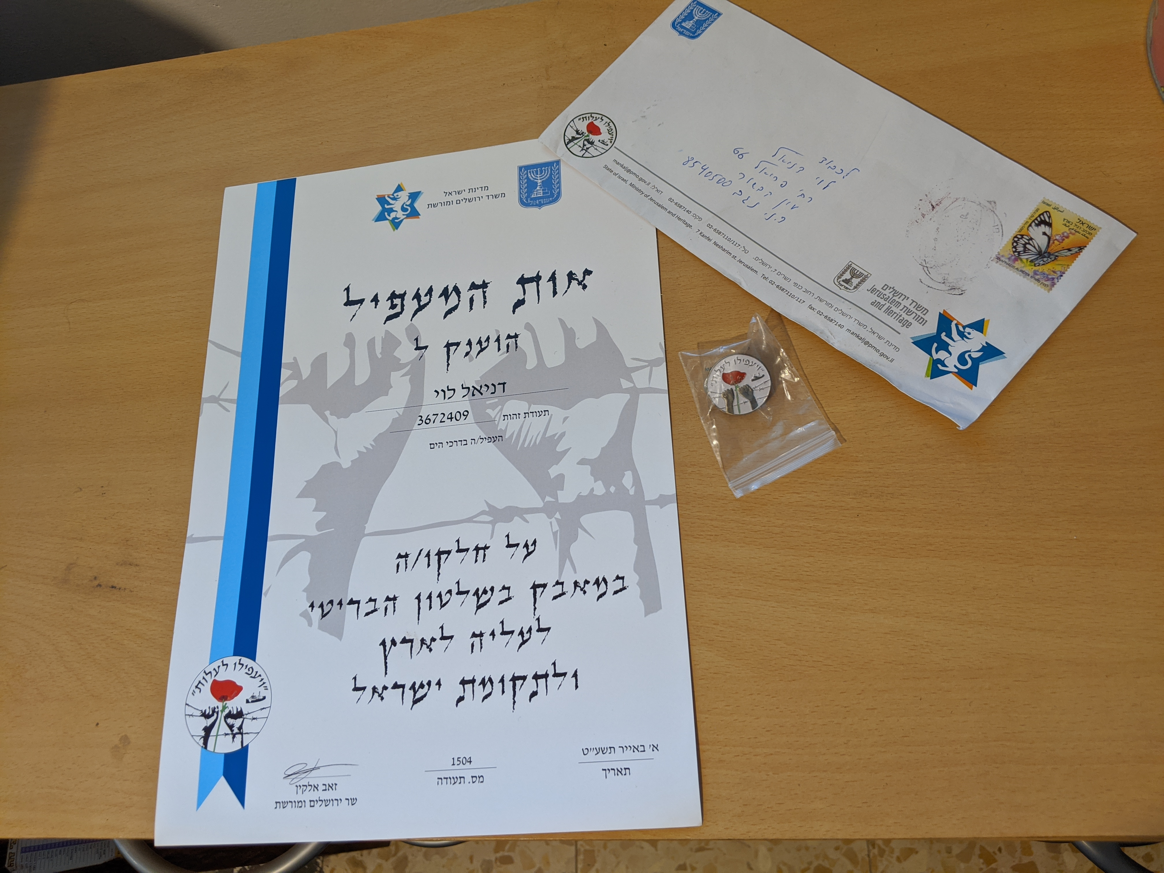 משרד המורשת וירושלים העניק אות ותעודת מעפיל בשנת 2019